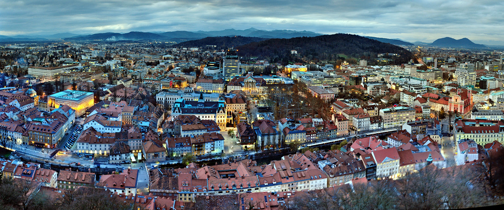 Center of Ljubljana from Air